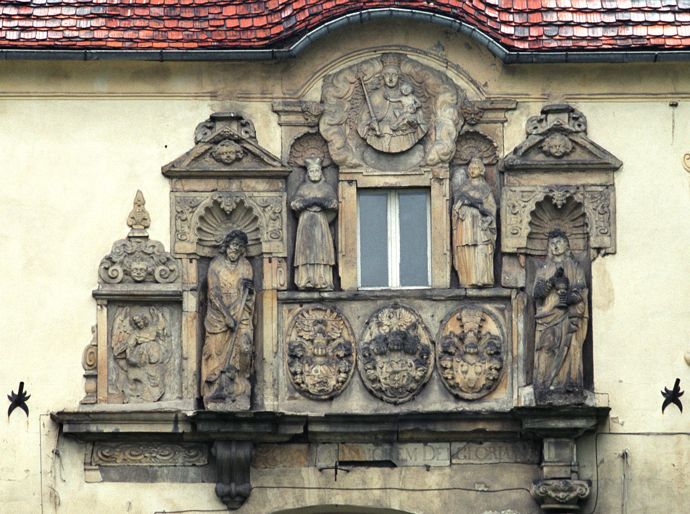 Głogówek